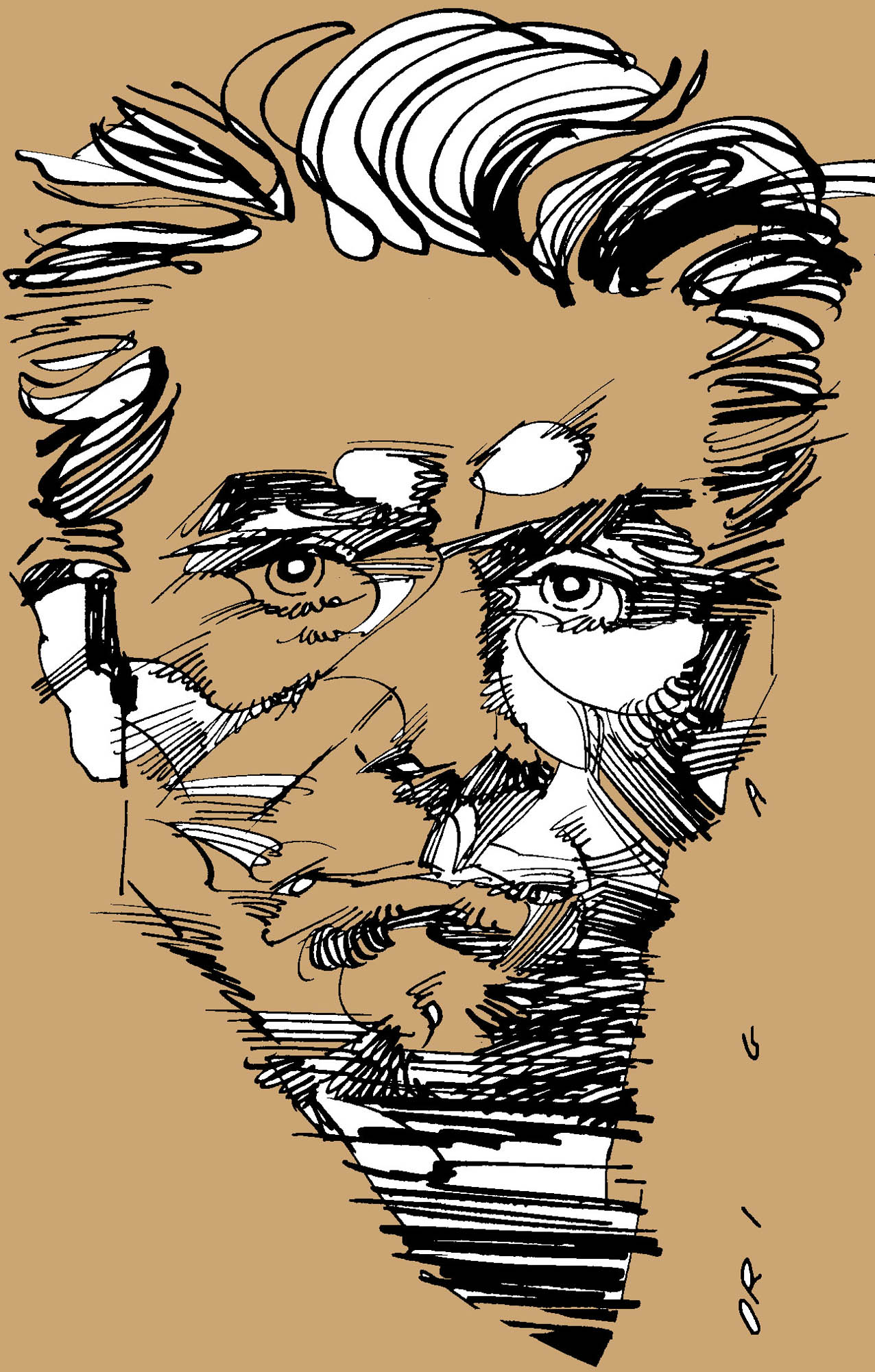 Frank Frazetta, illustratore e fumettista americano. Ritratto a pennino e china di Graziano Origa, 1997